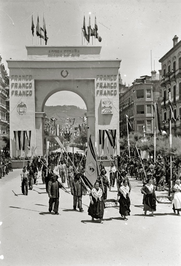 Actos celebrados en San Sebastián con motivo de la visita del dictador Francisco Franco y el conde Ciano, ministro de Asuntos Exteriores de la Italia fascistaEuskara: Donostian Francisco Franco diktadorearen eta Galeazzo Ciano konde eta Italia faxistako Kanpo Gaietako ministroaren bisitan egindako ospakizunak (1939ko uztaila)